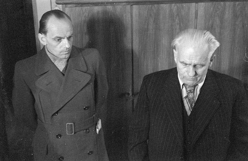 Original image description from the Deutsche Fotothek Porträt: Erich Weinert